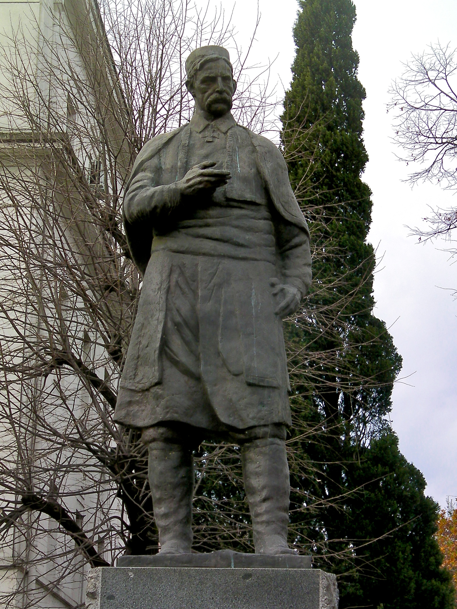 Spomenik Marku Miljanovu u Podgorici